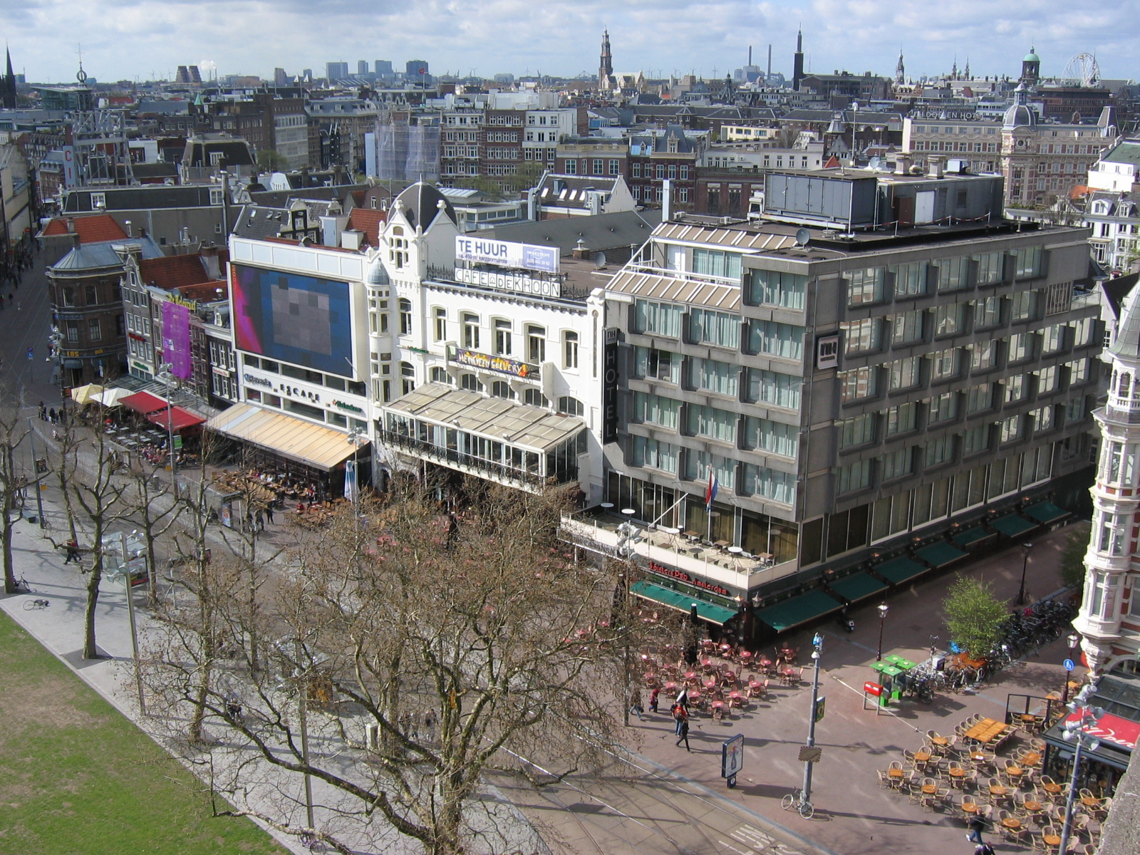 Verbouwing van het voormalige ABN-Amro hoofdkantoor aan het Rembrandtplein te Amsterdam Rondleiding op woensdag 21 april 2010 voor de architecten van de BNA Kring Amsterdam-Kennemerland, door Frits van Dongen van de Architecten Cie.